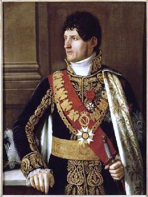 Portrait de Félix Baciocchi (1762-1841), Huile sur toile, 97 x 73 cm